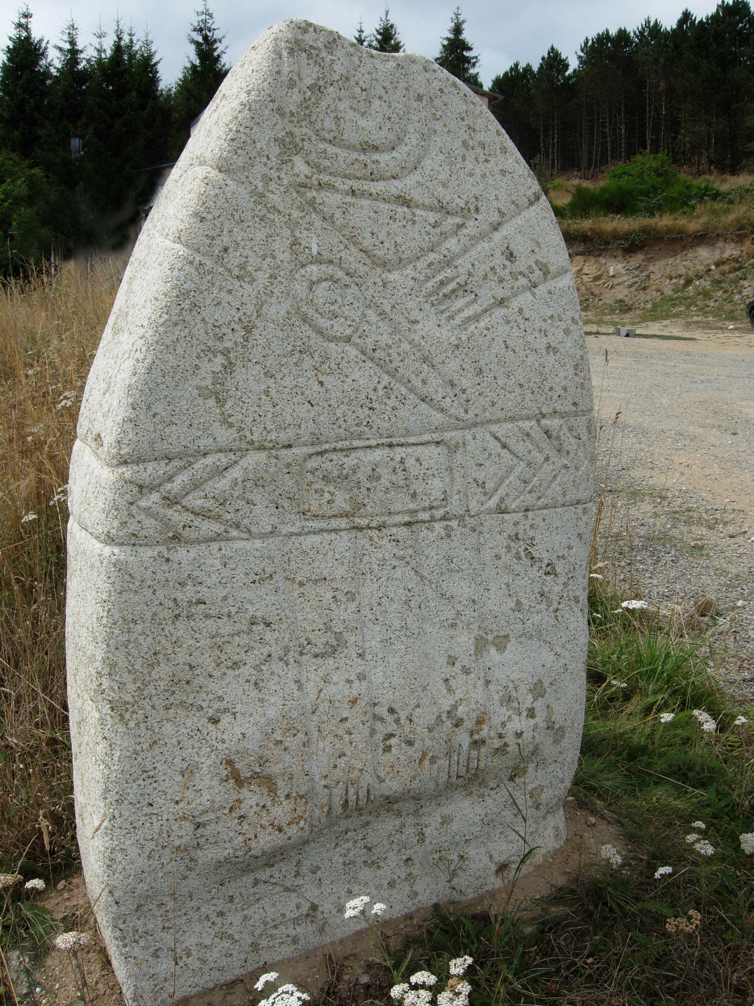 Cambon-et-Salvergues (Hérault) - Statue-menhir de Salverguettes (copie).